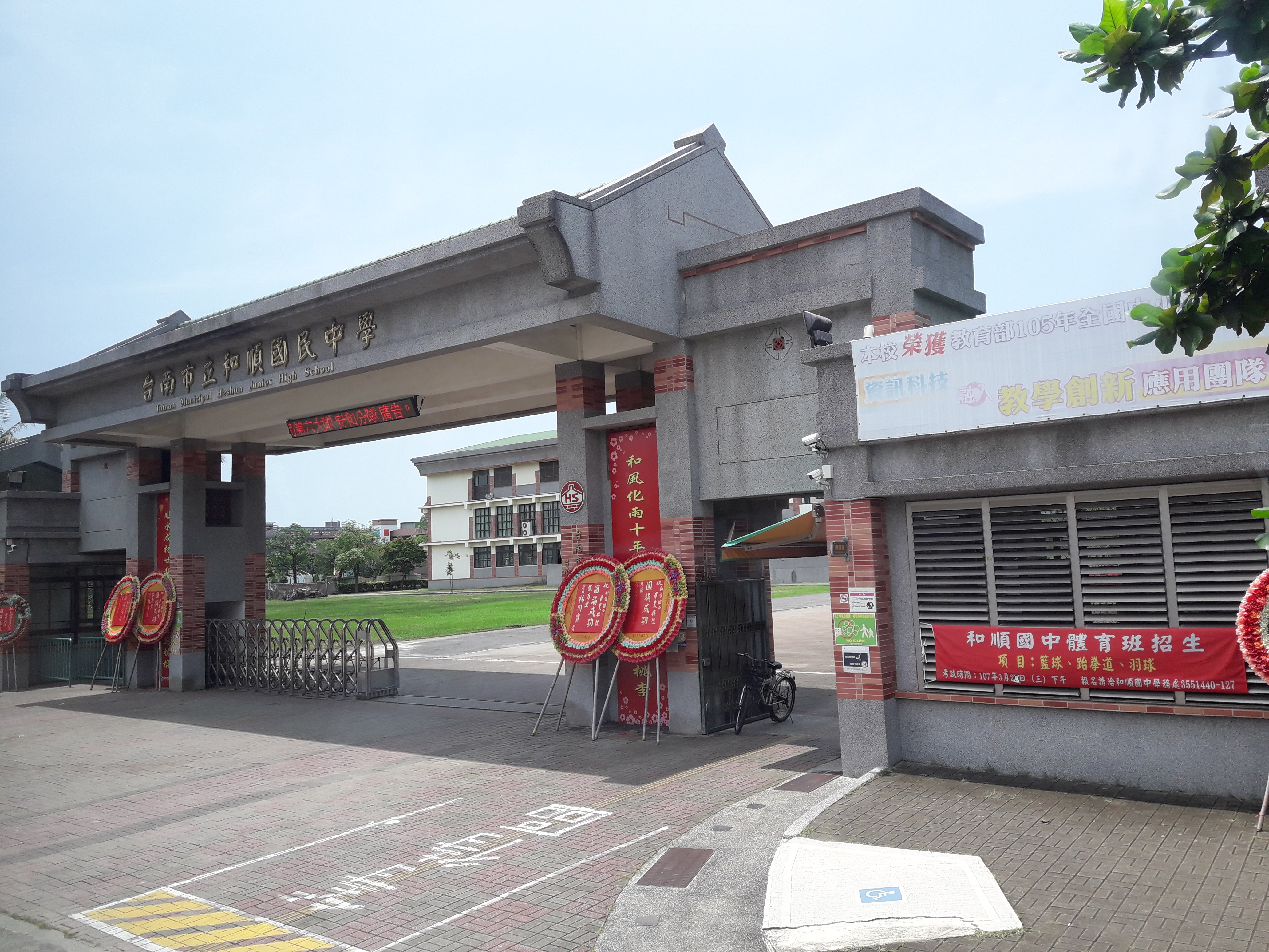 臺南市立和順國民中學。